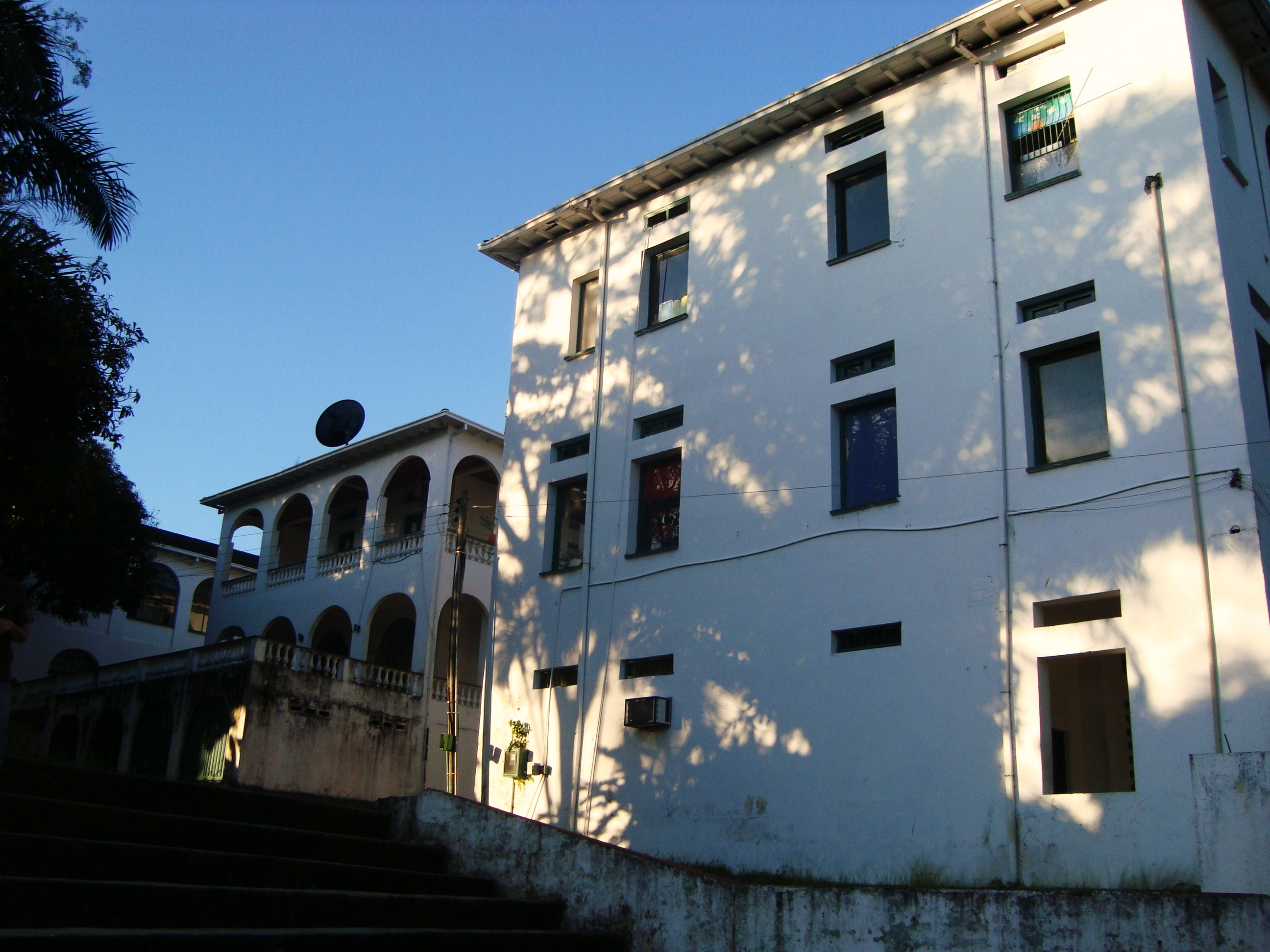 Edificio Curiplaya - Palacio de Bellas Artes de Florencia, Caquetá